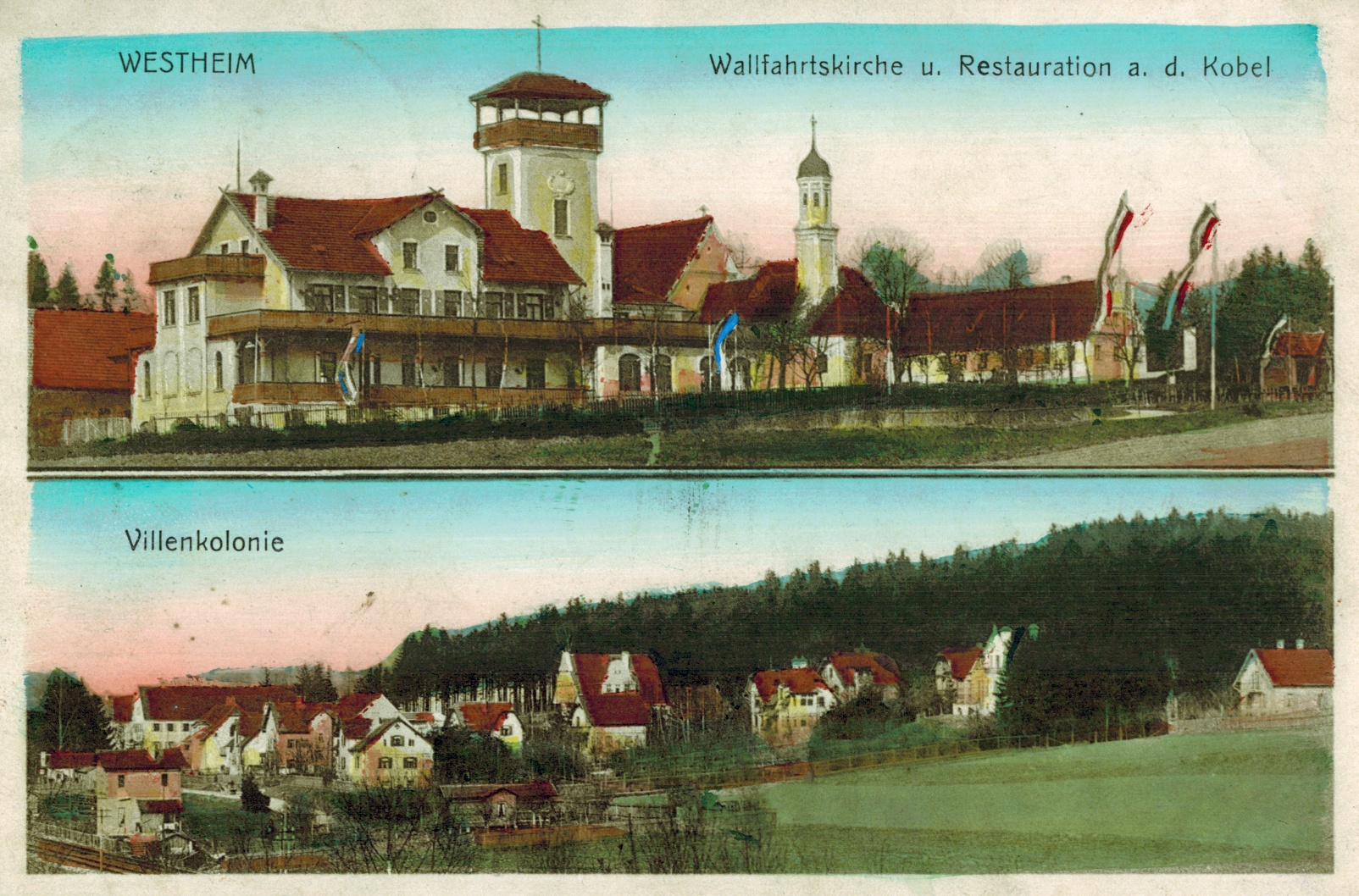 Alte Postkarte von Westheim, Kobel und Villenkolonie, gelaufen 1911.